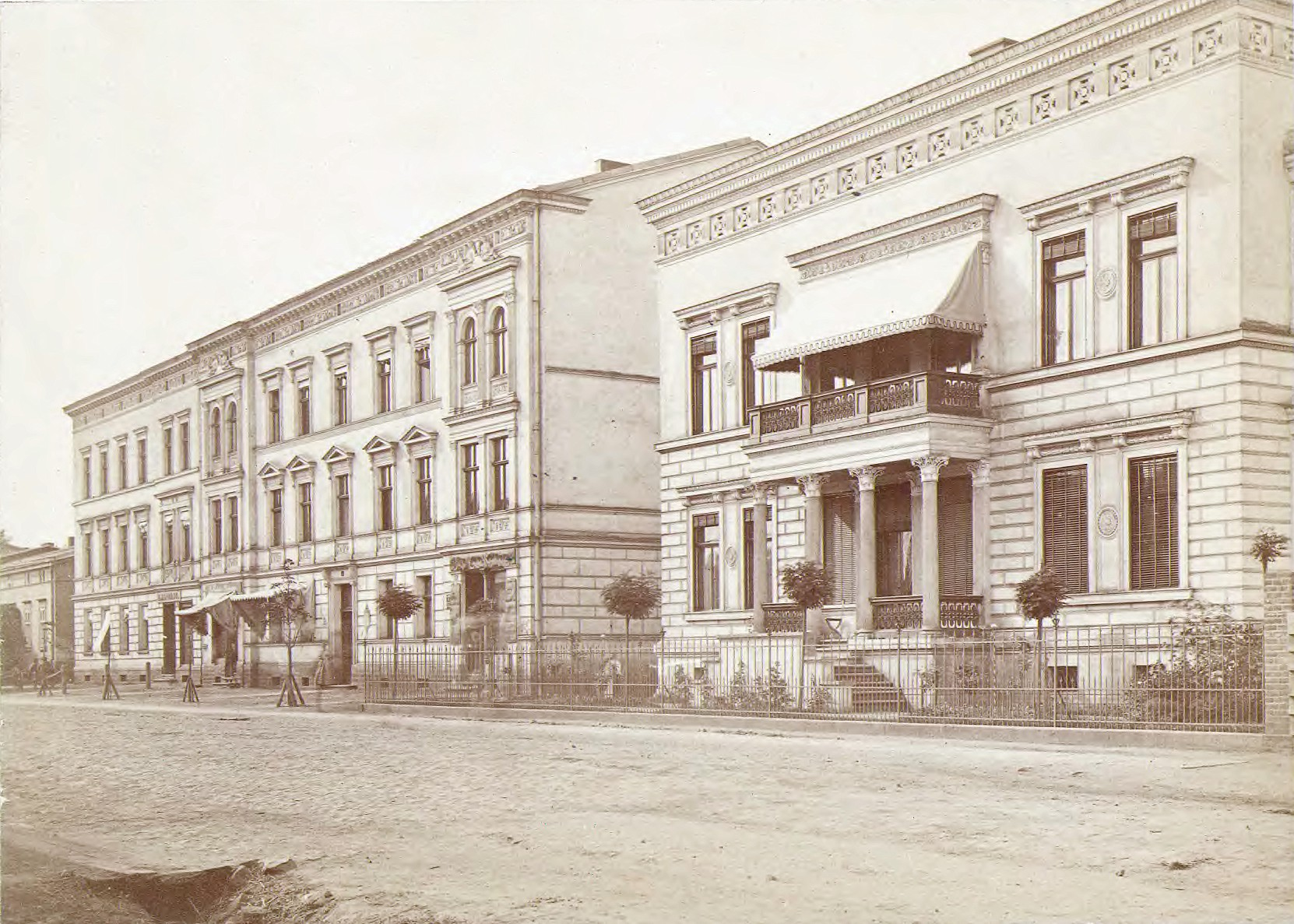 Friedrichstraße in Kattowitz mit der Villa von Baumeister Ignatz Grünfeld (rechts).